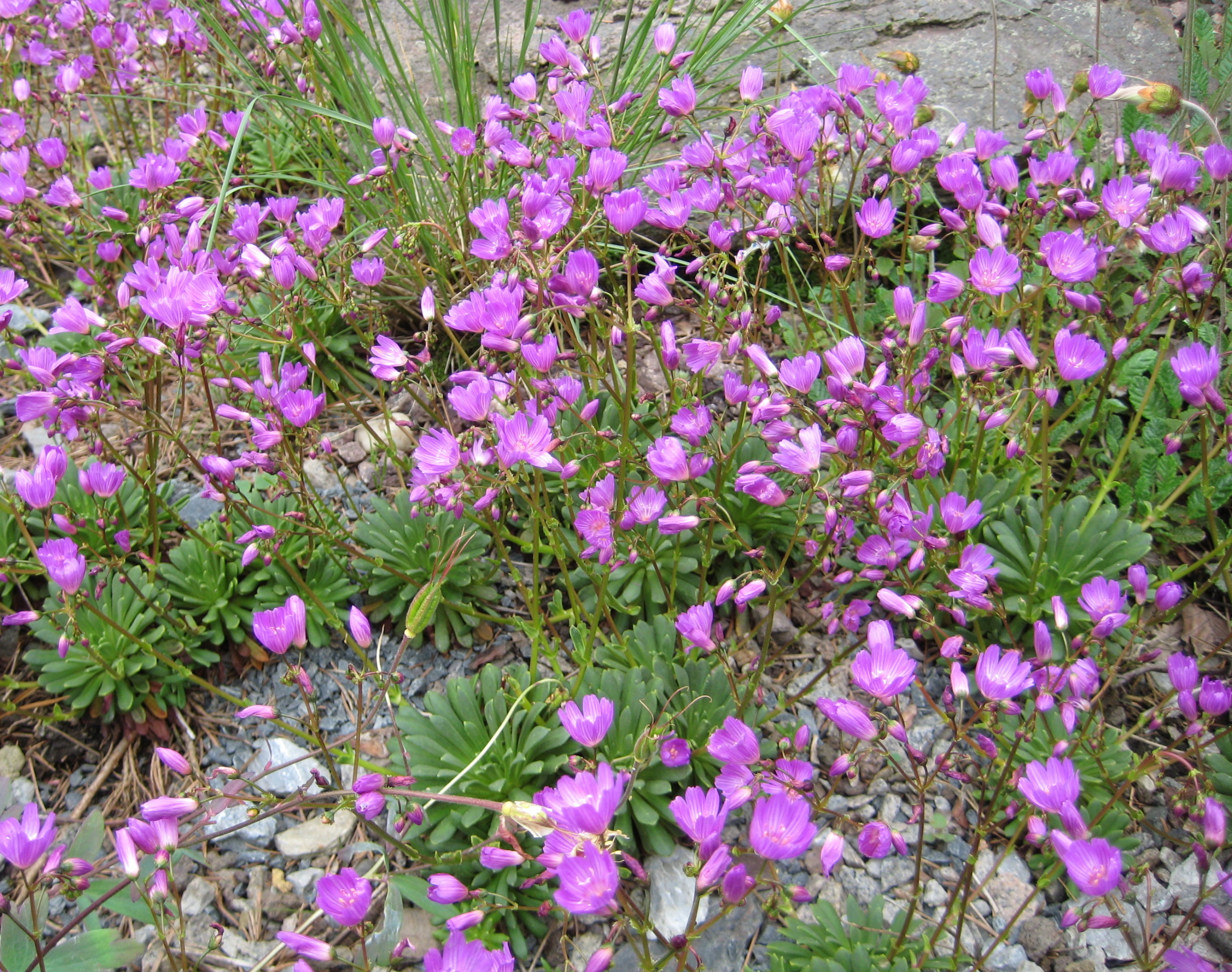 Lewisia columbiana im Botanischen Garten Dresden